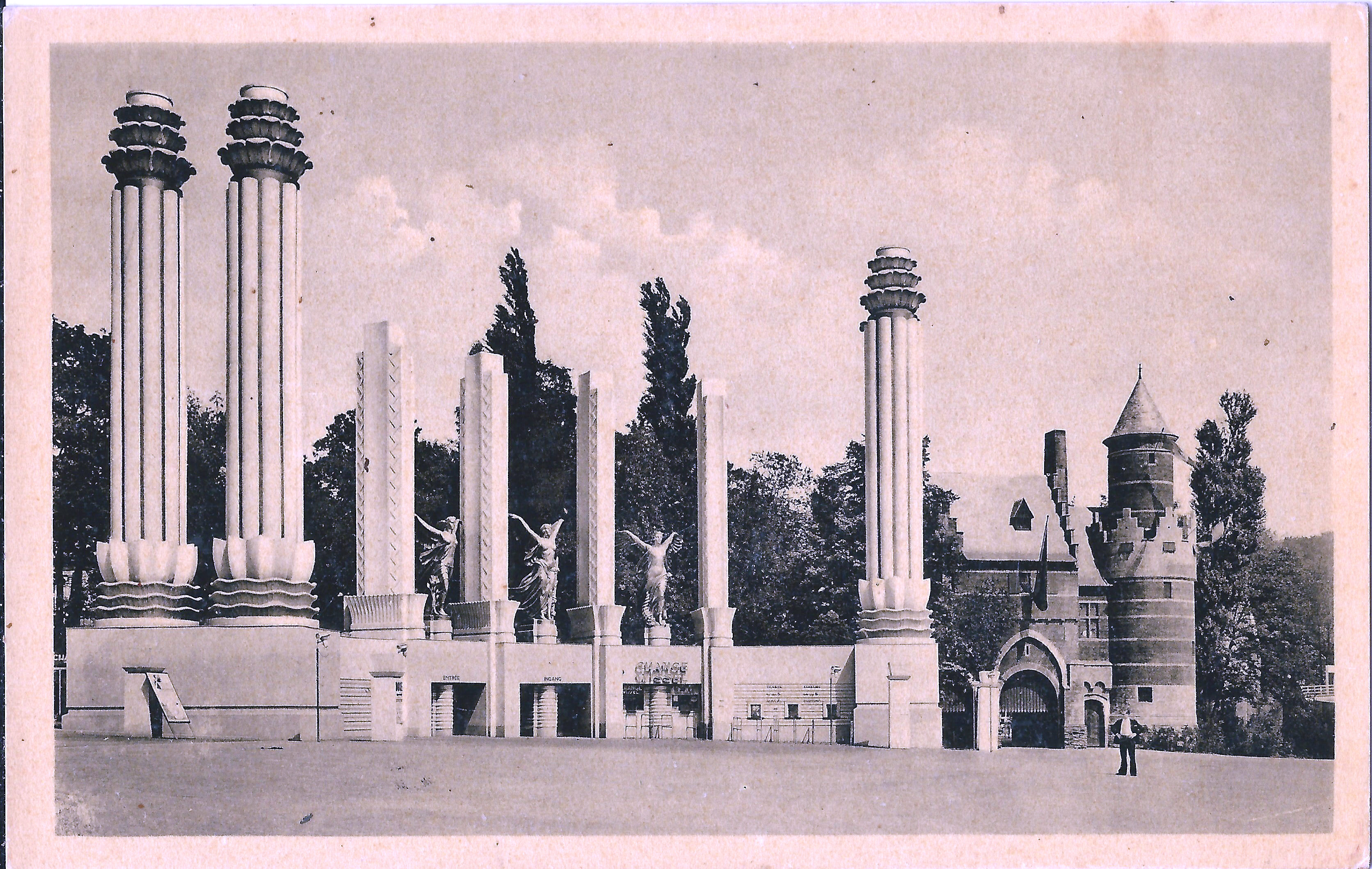 Exposition universelle de 1935 à Bruxelles (Belgique) ; entrée principale